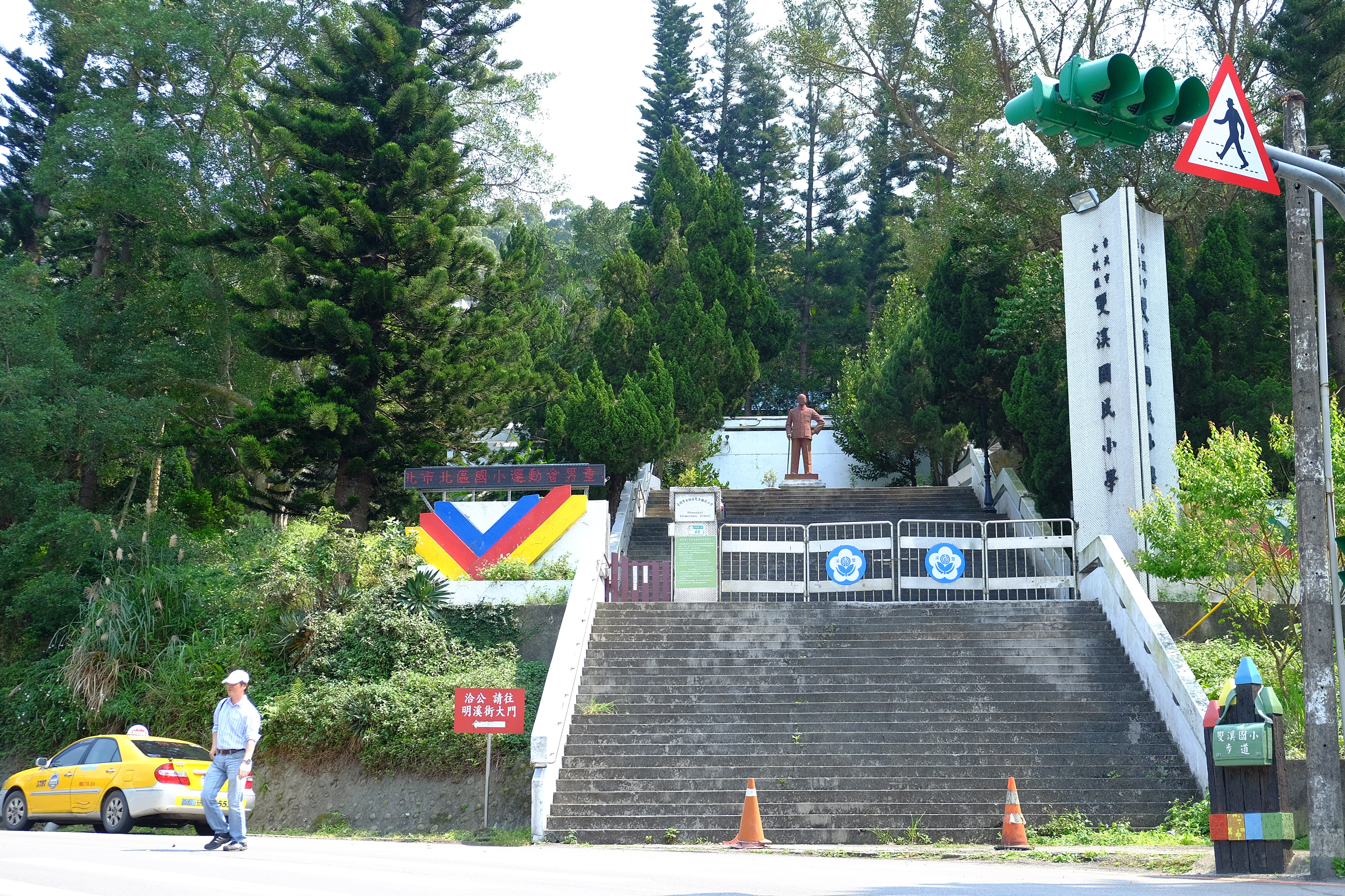 ShuangXi Elementary School Gate 2018